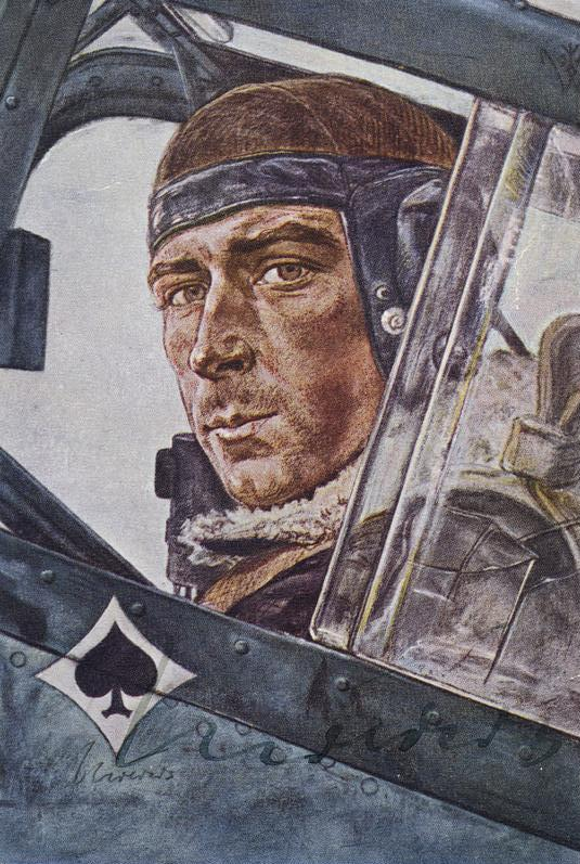 W. Willrich: Oberstleutnant Mölders einer unserer erfolgreichsten Jagdflieger [Zeichnung] Verlag: Volksbund für das Deutschtum im Ausland, W. II. Berlin W 30